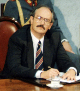 Jaime Luis Estévez Valencia (Santiago, 27 de septiembre de 1946) es un economista, investigador, consultor y político chileno, ex presidente de la Cámara de Diputados de de su país además de ex ministro de Estado del presidente Ricardo Lagos.